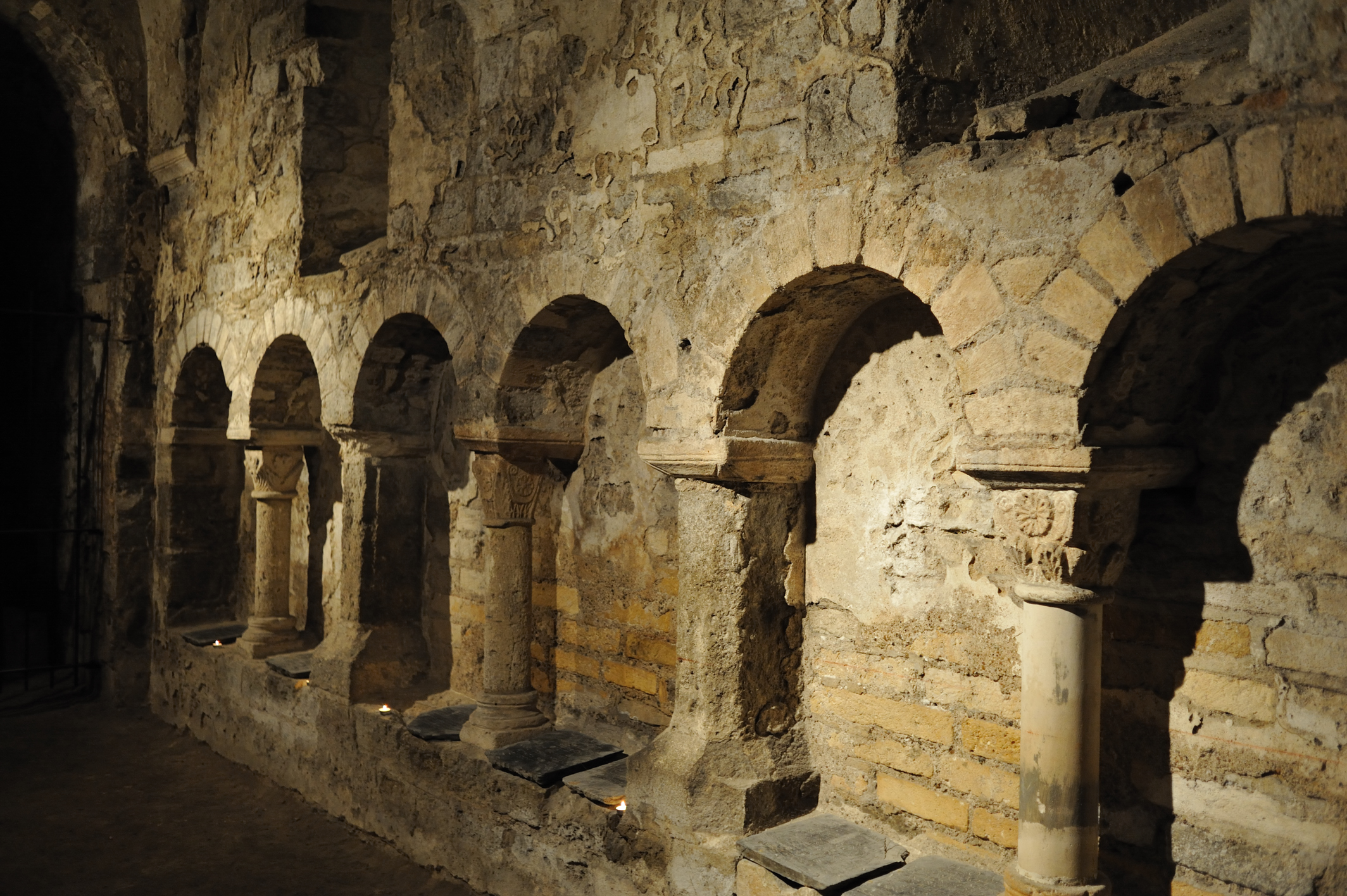 Crypte Saint-Aignan, Orléans, Loiret, France